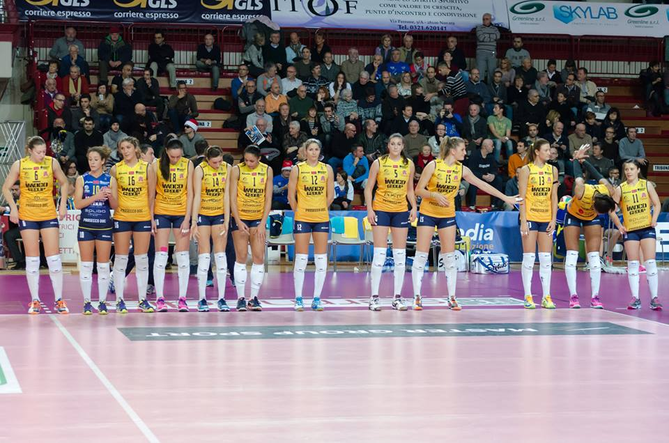 Stagione 2014-15